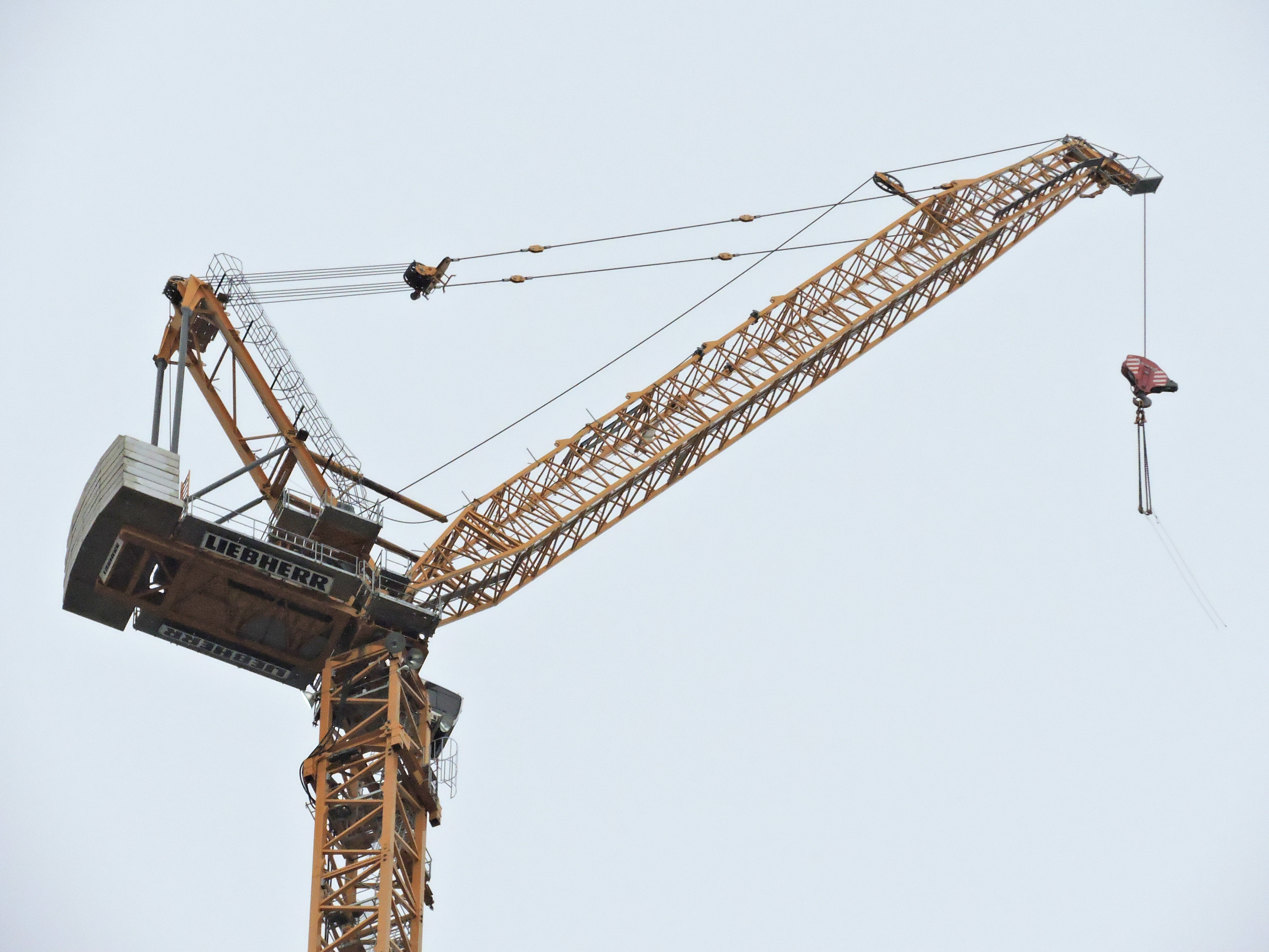 Верхнеповоротный башенный кран «Liebherr-710 HC-L 32/64 Litronic» с маховой стрелой во время строительства Лахта-центра